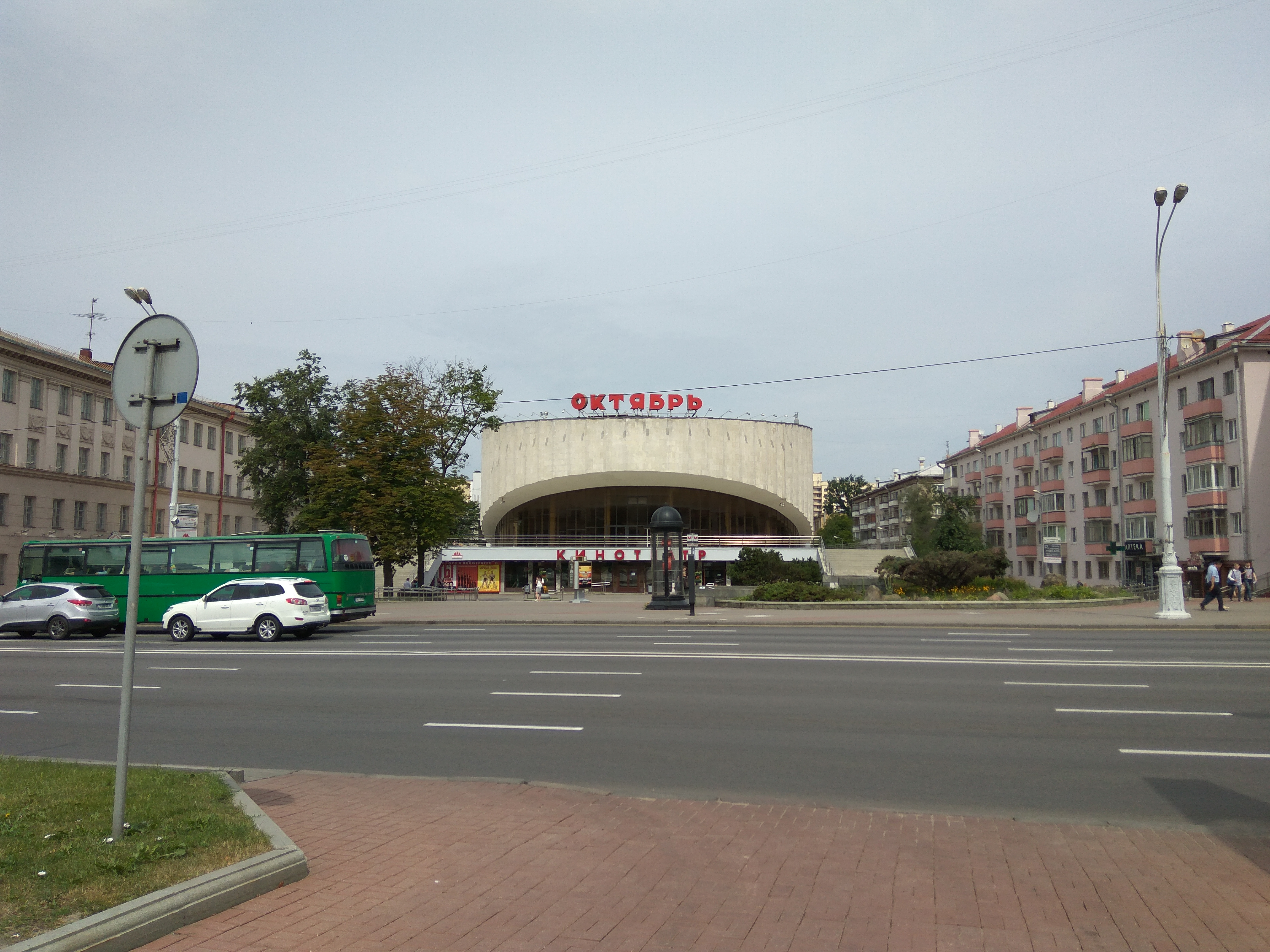 Мінск. Праспект Незалежнасці (ад Калініна да Якуба Коласа)